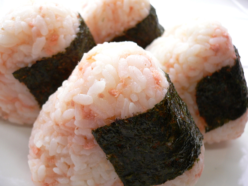 Onigiri.